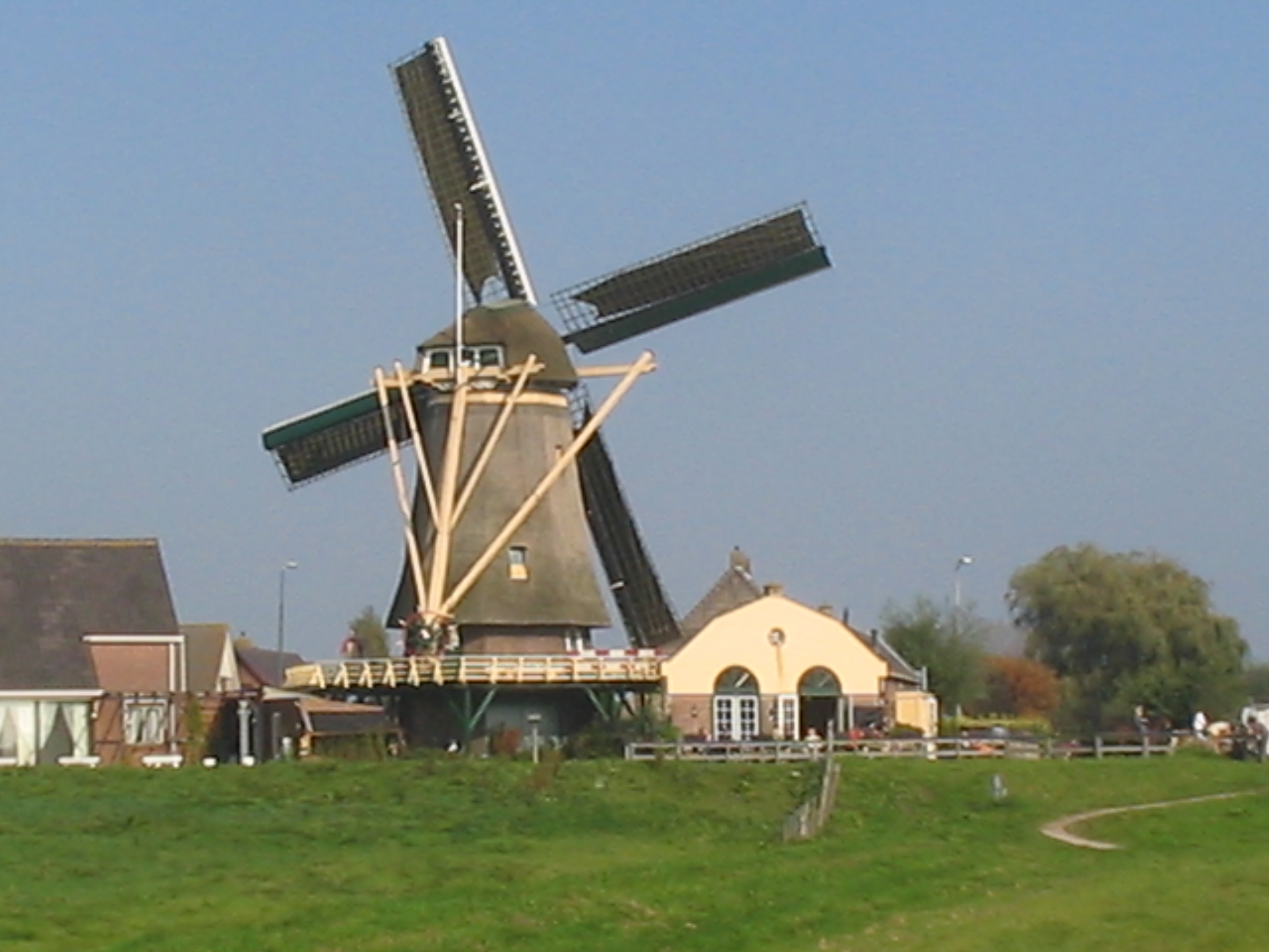 Molen Windlust Nootdorp, 15 oktober